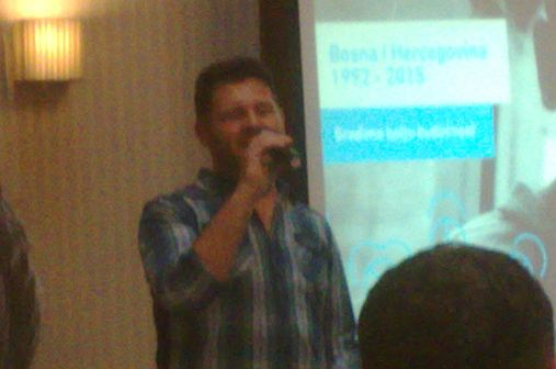 Eldin Huseinbegović na humanitarnom susretu organizacije Islamic Relief "Gradimo bolju budućnost" 15. juna 2015.